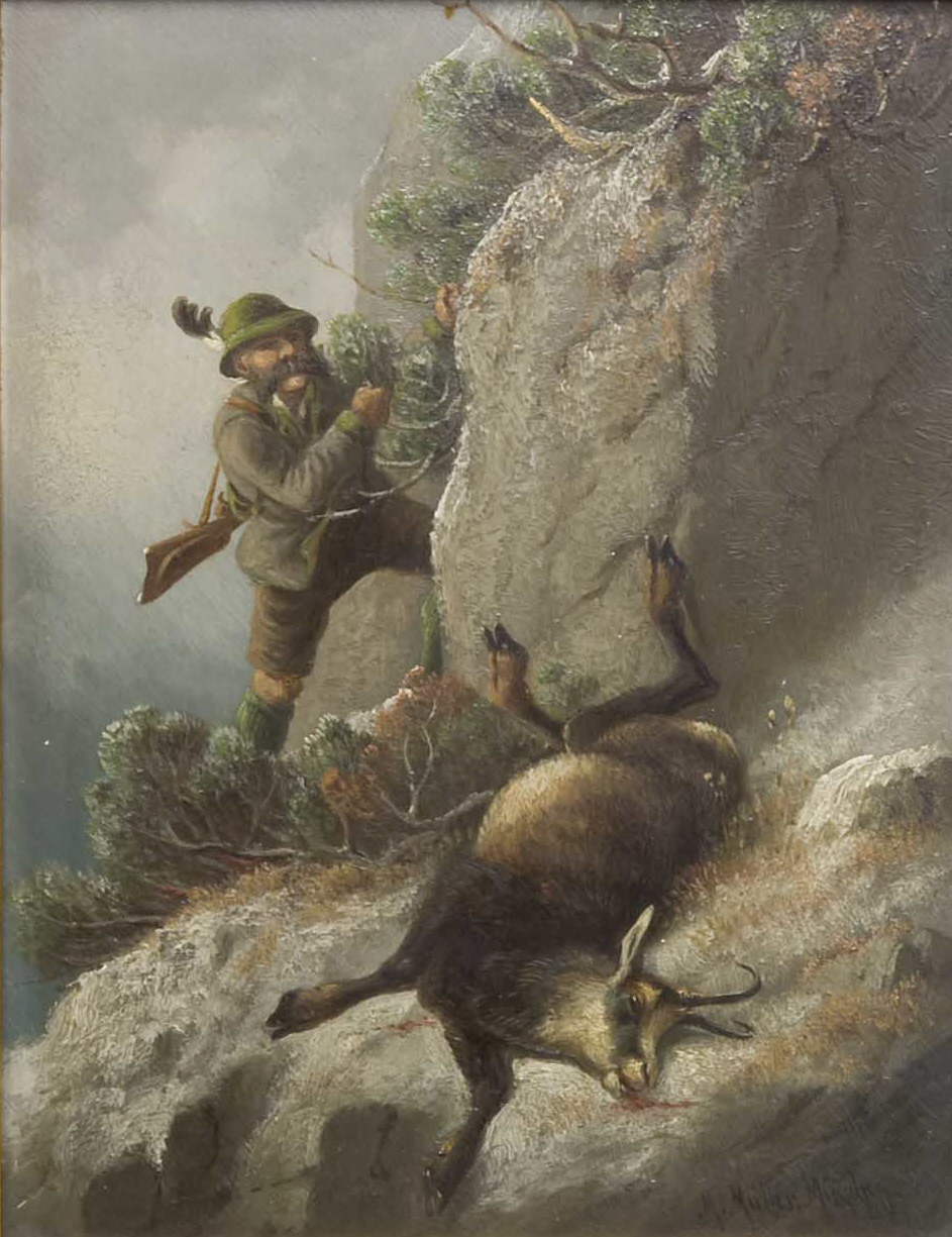 Gamsjäger. Öl auf Holz. Unten rechts signiert "M. Müller München". 16 x 21 cm